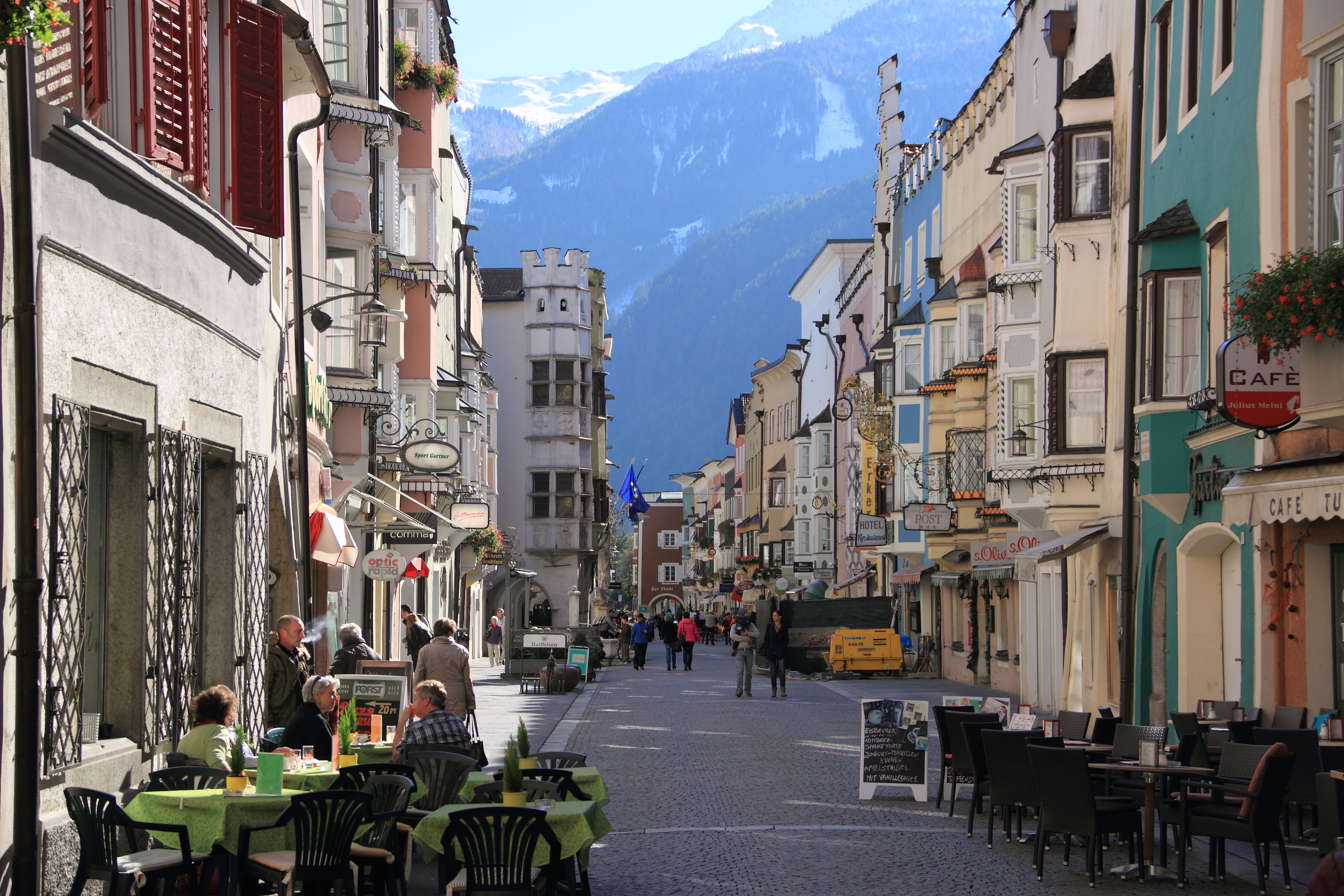 Straßenszene in der Altstadtvon Sterzing.